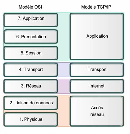 Comparaison des modèles OSI et TCP/IP